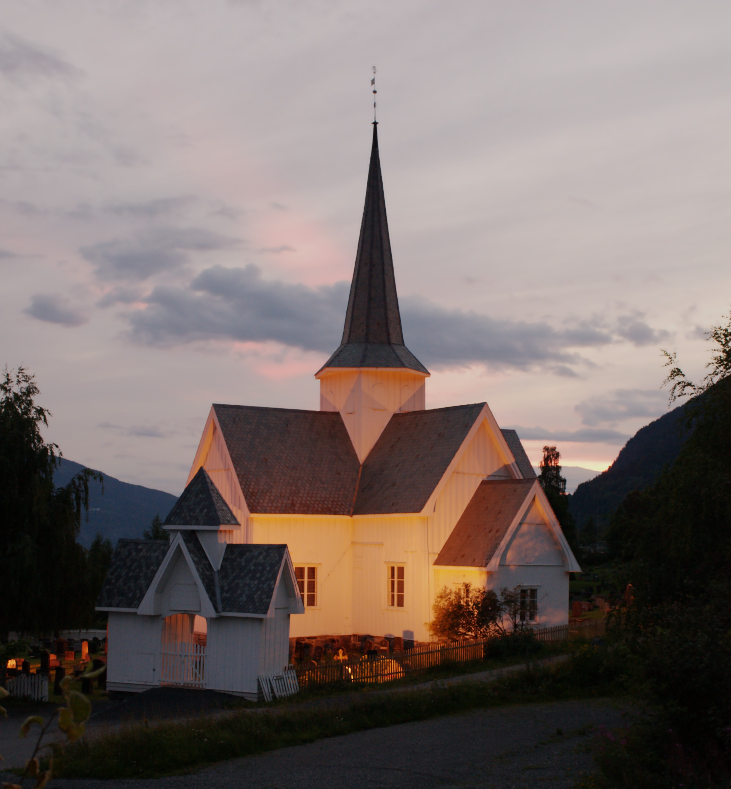 Aurdal kirke, Nord-Aurdal, Norge